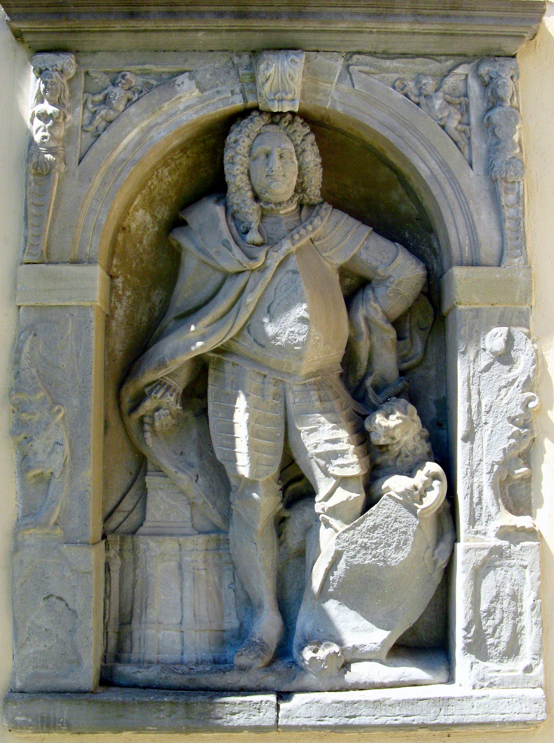 Sandsteinfigur von Graf Ferdinand Ludwig, dem Erbauer der Wolfegger Kirche, geschaffen von Mang Anton Stapf, 1735